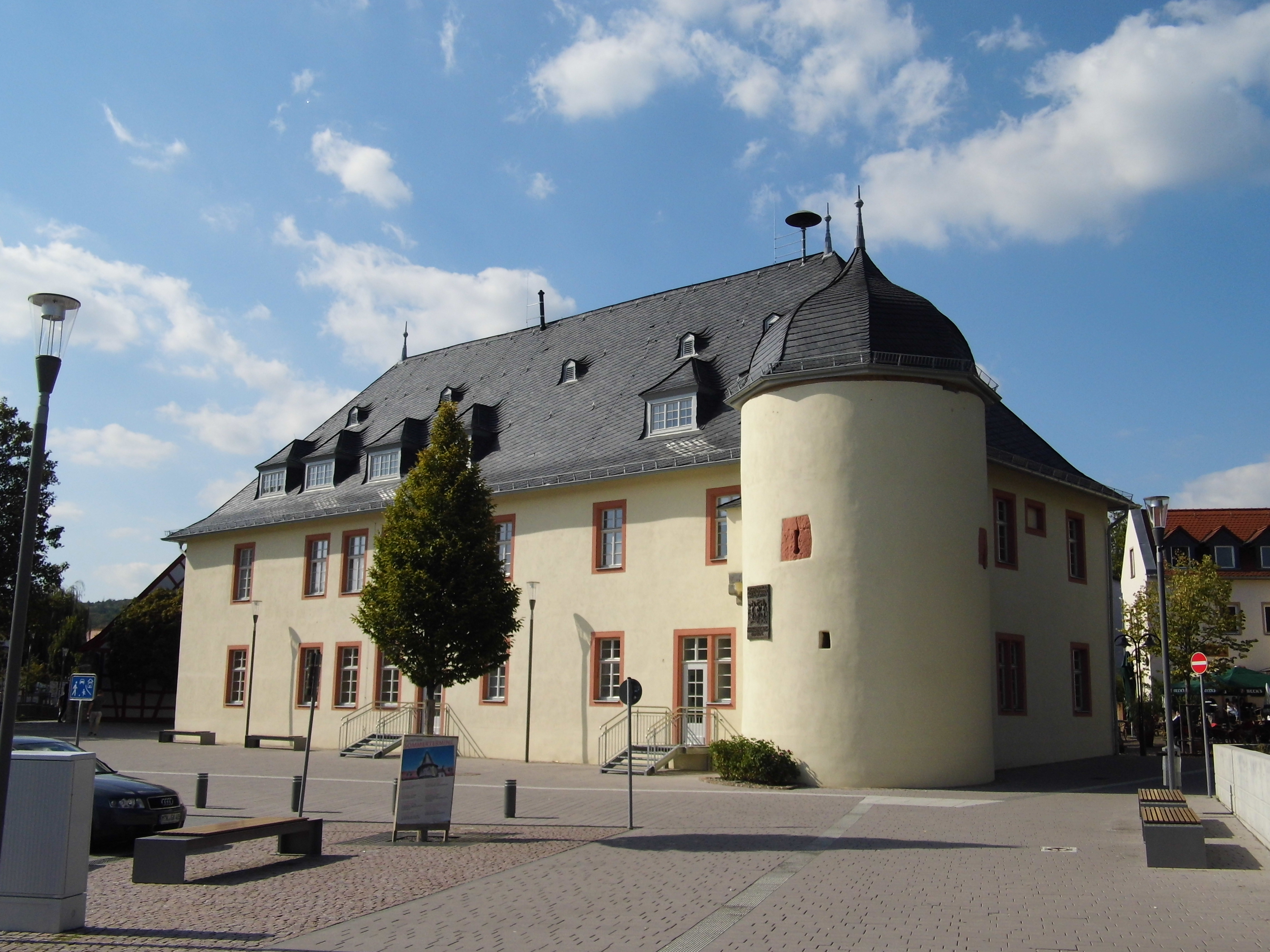 Hofheim, Kellereigebäude